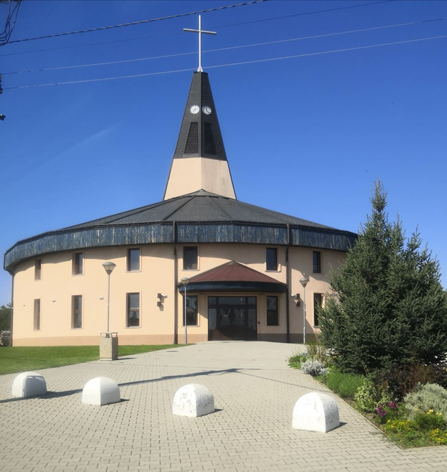 Pata, Kostol narodenia Panny Márie (nový)